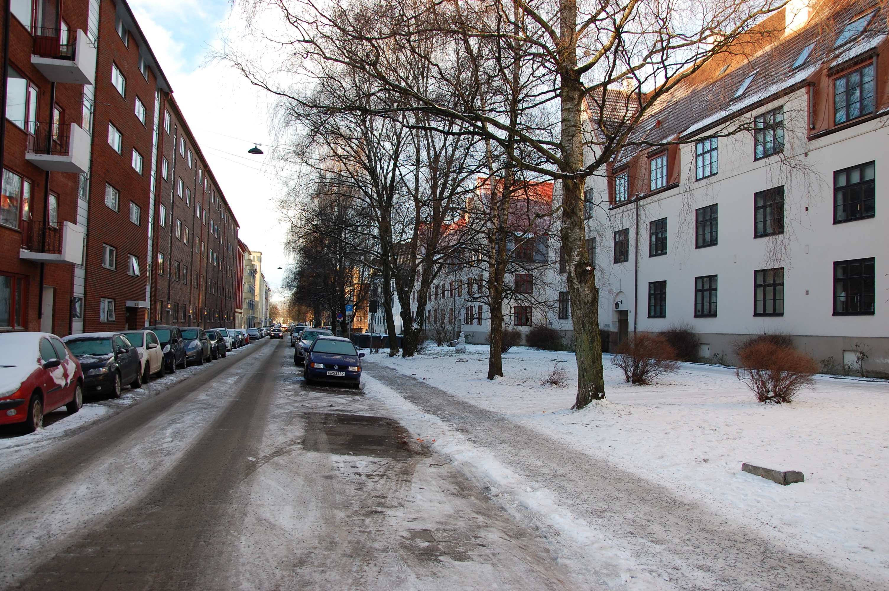 Sarpsborggata på Bjølsen i Oslo, sett fra Maridalsveien mot Bergensgata